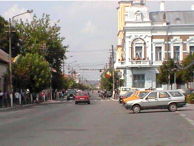 Gherla